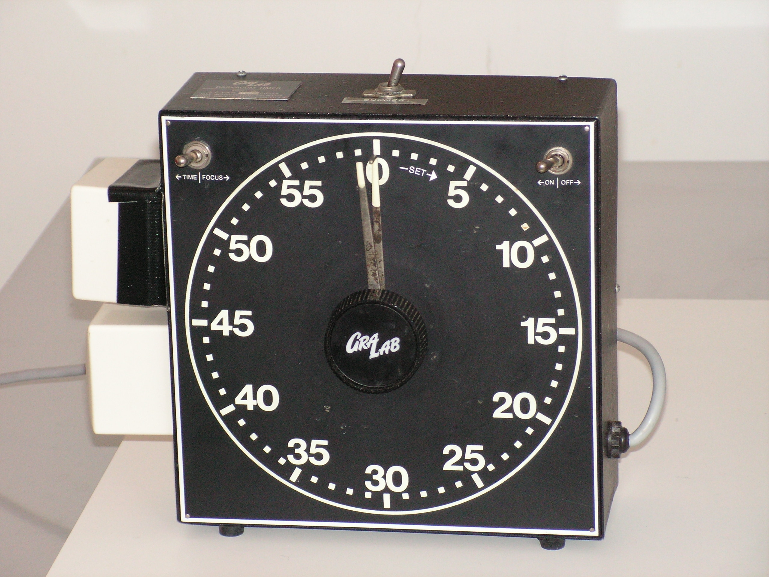 Electronic timer